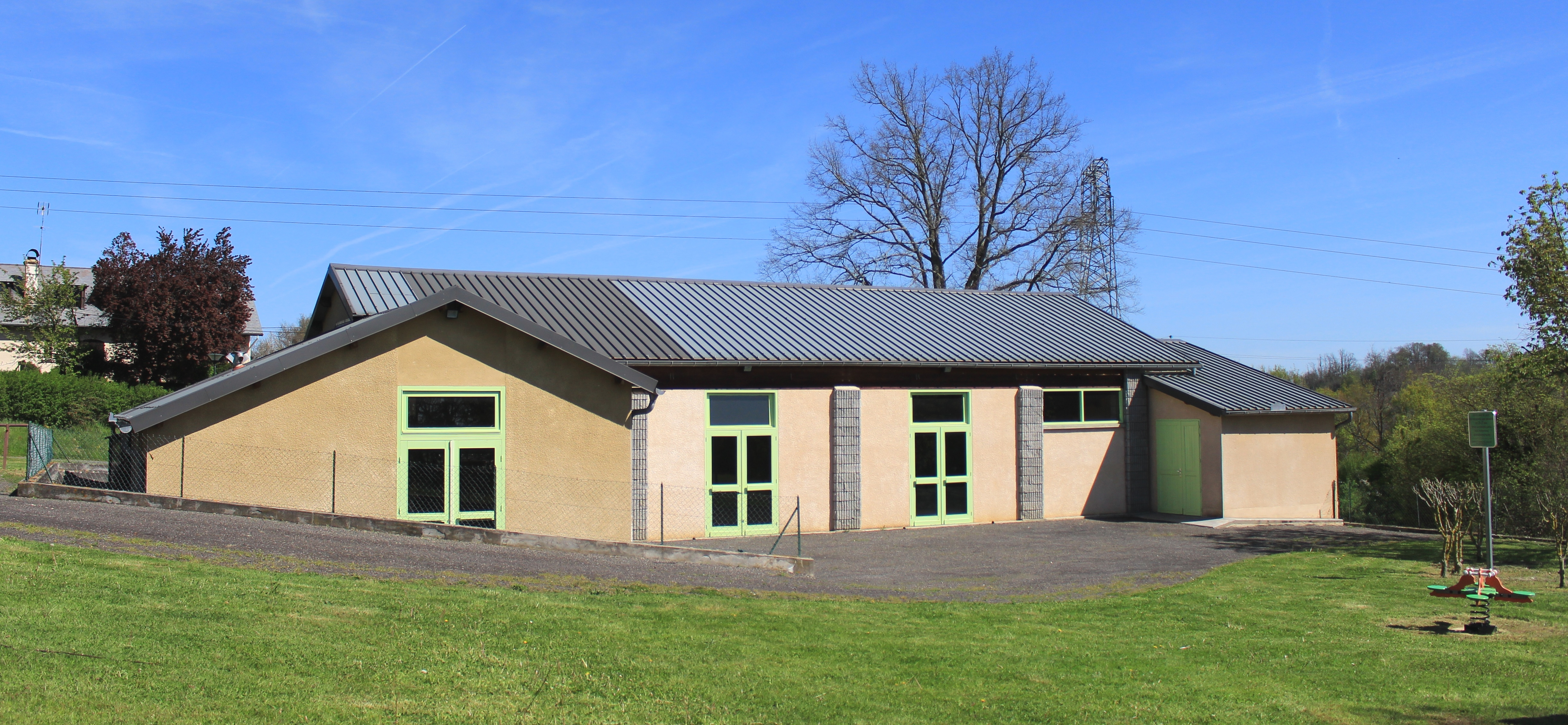 Salle des fêtes de Sabalos (Hautes-Pyrénées)